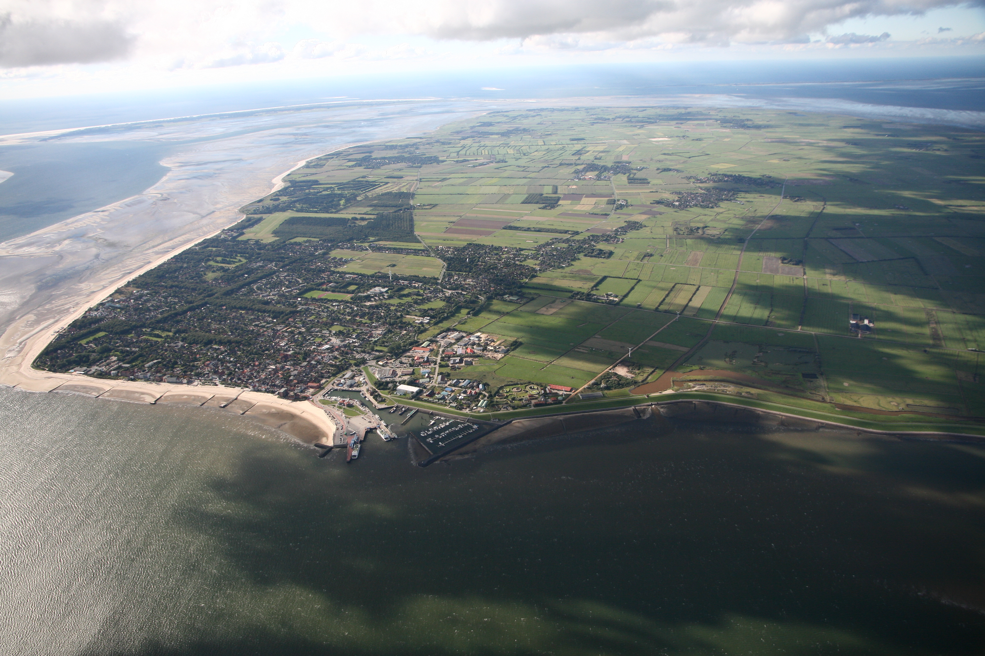 Luftbild: Insel Föhr, Wyk auf Föhr